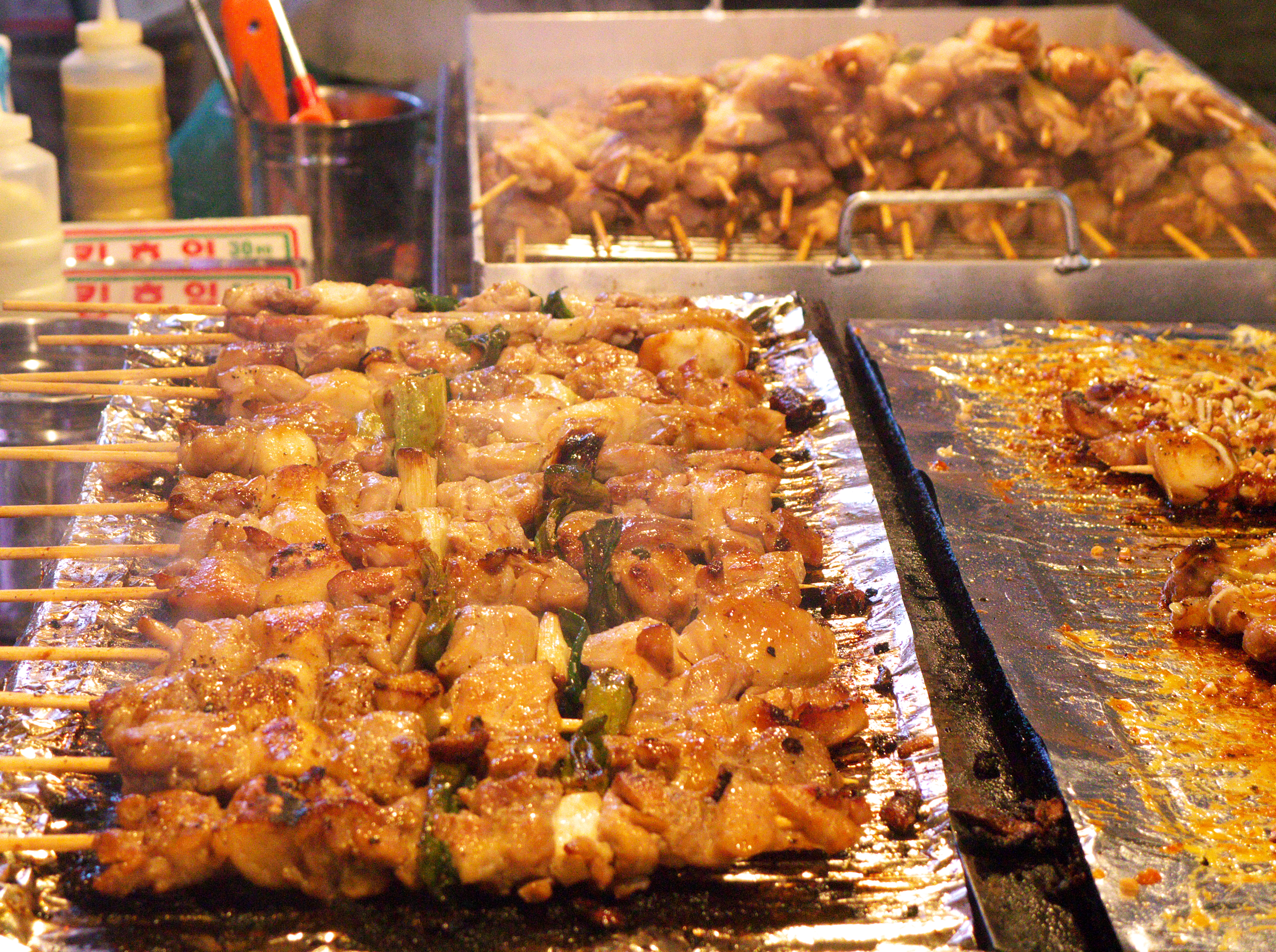 Street Food - Chicken skewers / Dakkochi (닭꼬치)